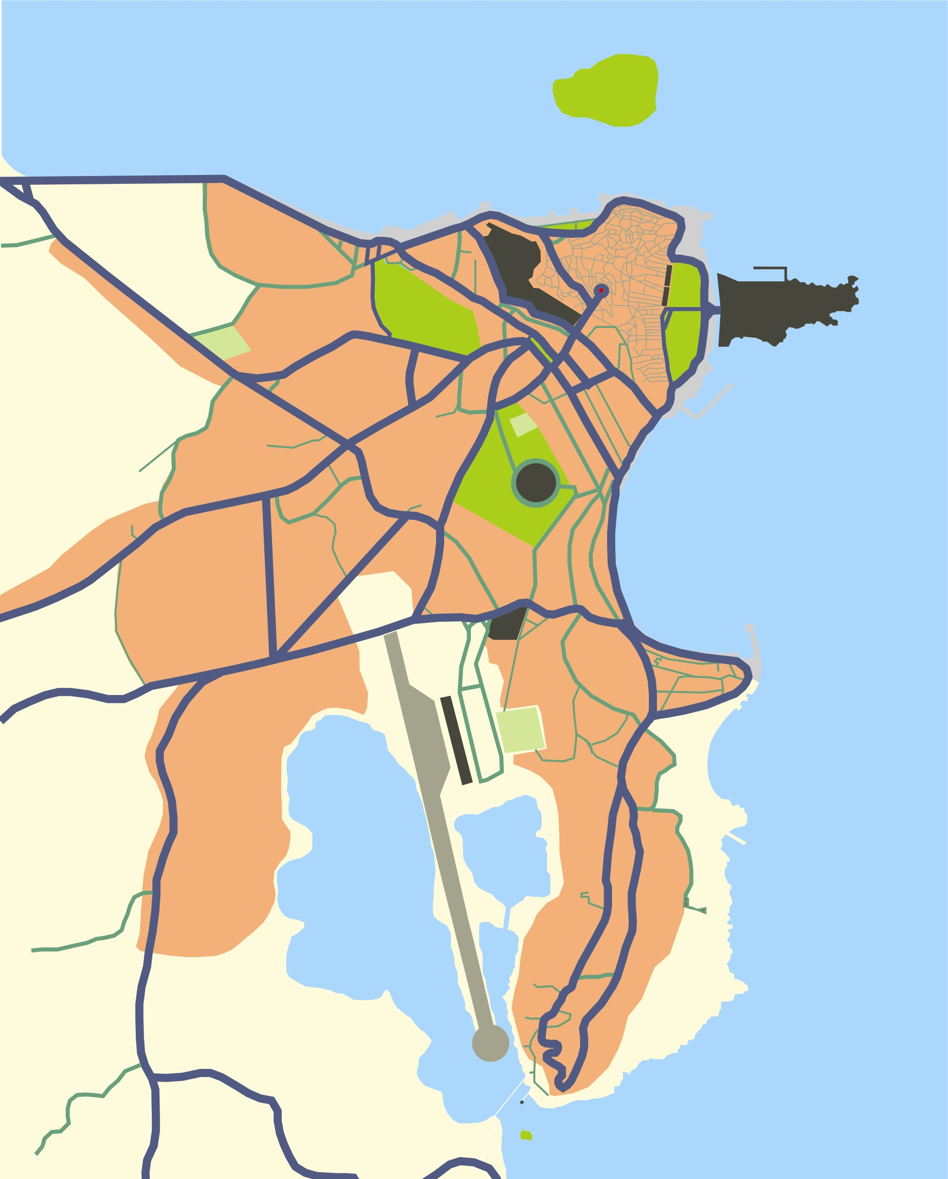 Χάρτης της Κέρκυρας